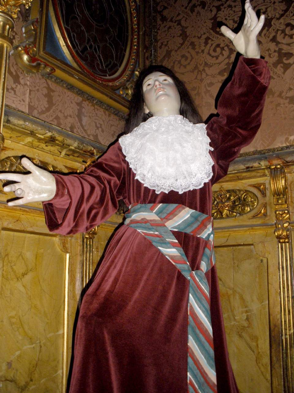 Iglesia de la Vera Cruz (Salamanca)